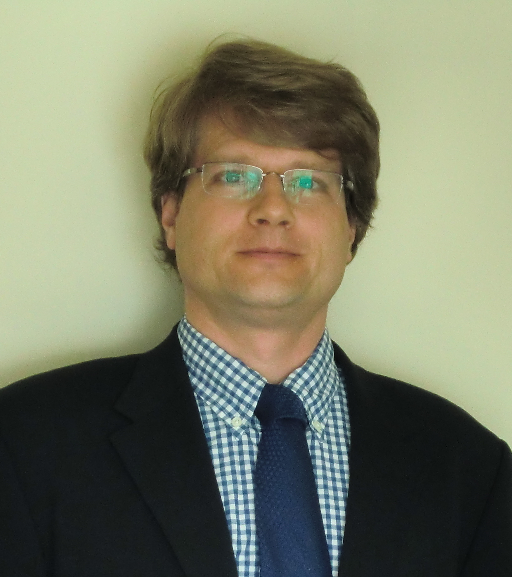 Yvan Dutil.